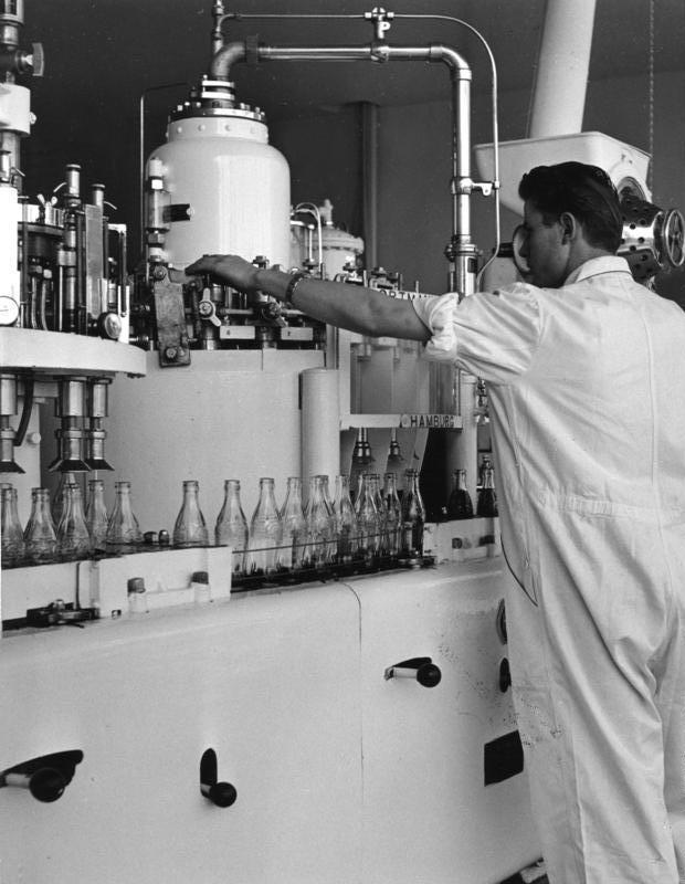 25.9.53 Coca-Cola Abfüllbetrieb Bad Godesberg